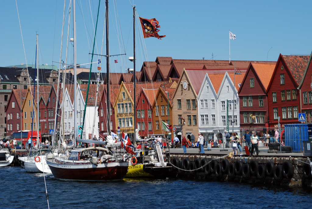 Bryggen, Bergen, Norway